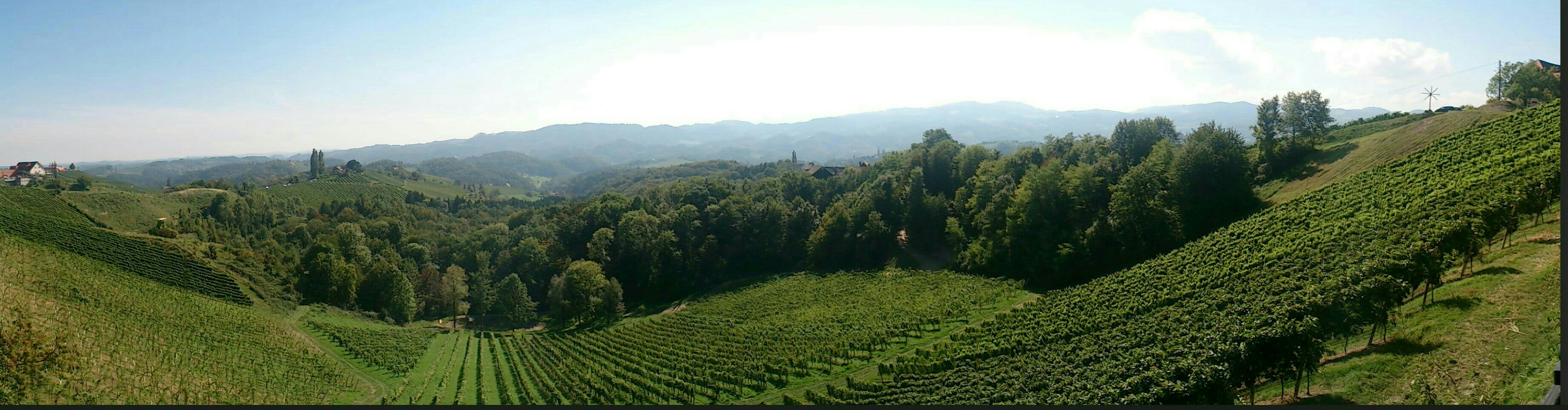 Weinberge in der Südweststeiermark, ein Klapotetz befindet sich am rechten Bildrand